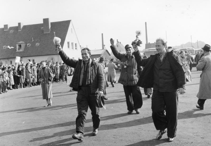 Heimkehrer im Lager Friedland, Besuch des Bundespräsidenten, 17.-19.10.1955 Information added by Wikimedia users.